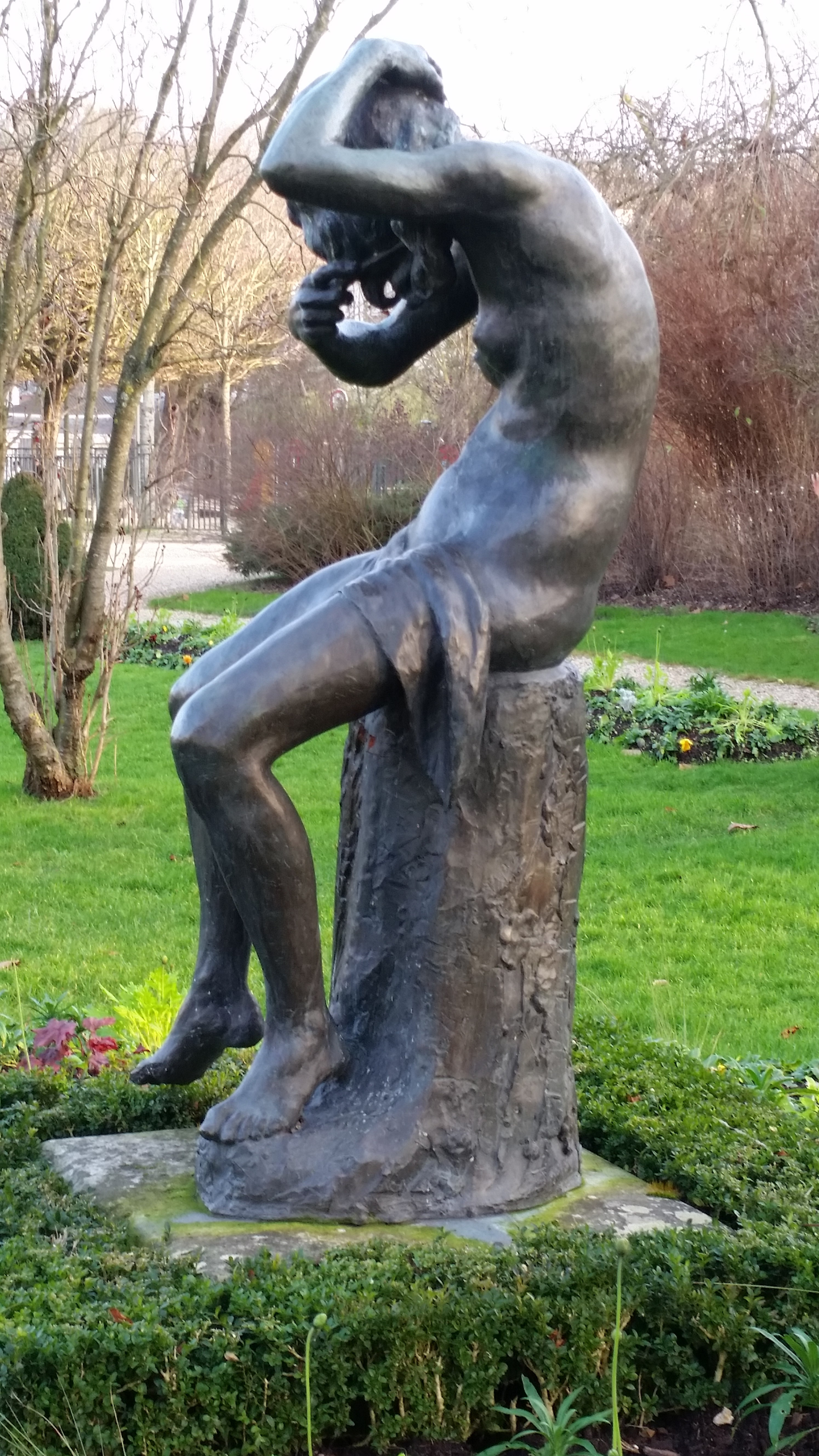 Lucile se coiffant : bronze de Stéphan Buxin (1909-1996) à Sèvres (Hauts-de-Seine, France)